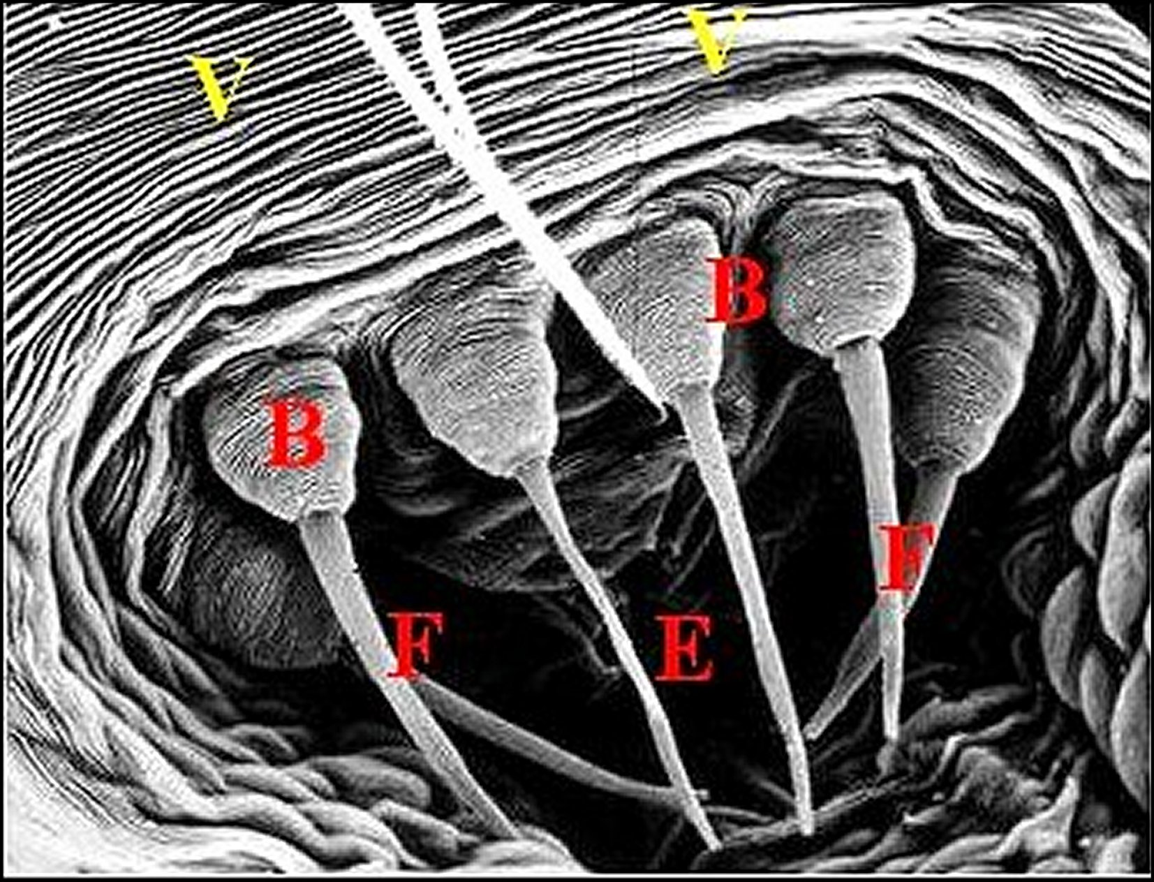 Fusules épigastriques de Ochyrocera caeruleo-amethystina vues au microscope électronique à balayage